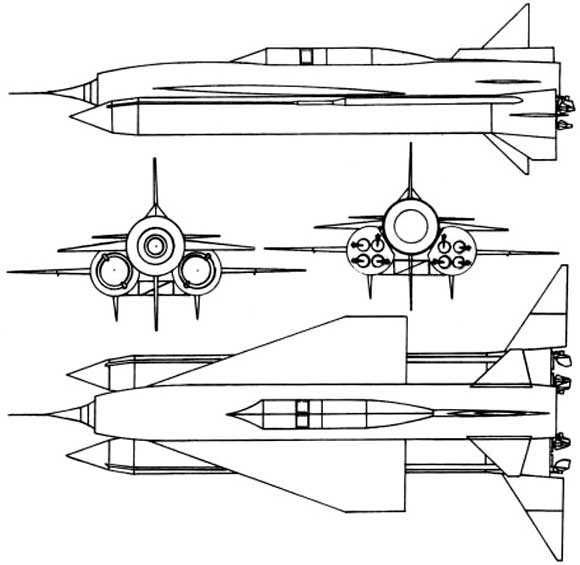 W-350 Burja